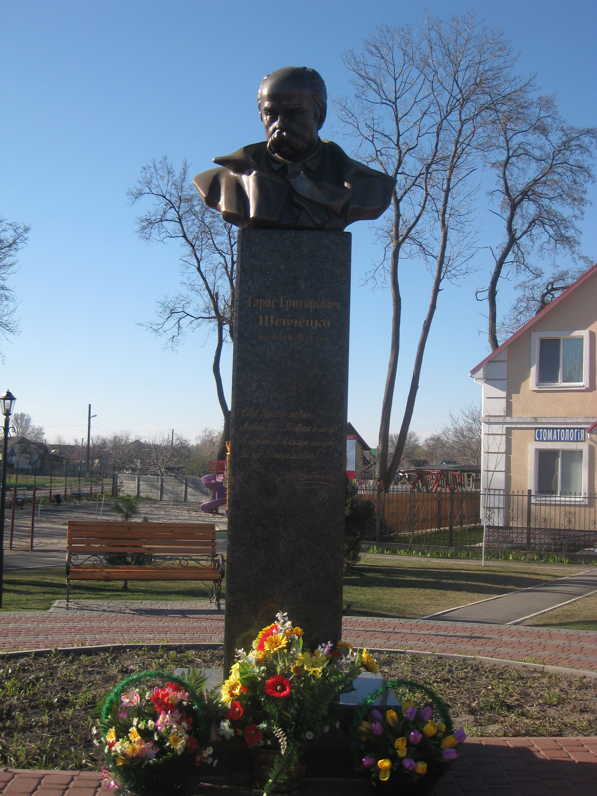 Пам'ятник Т.Г. Шевченку, с. Гнідин